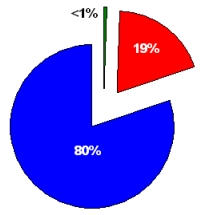 Verteilung der sozialversicherungspflichtig Beschäftigten auf die 3 Sektoren